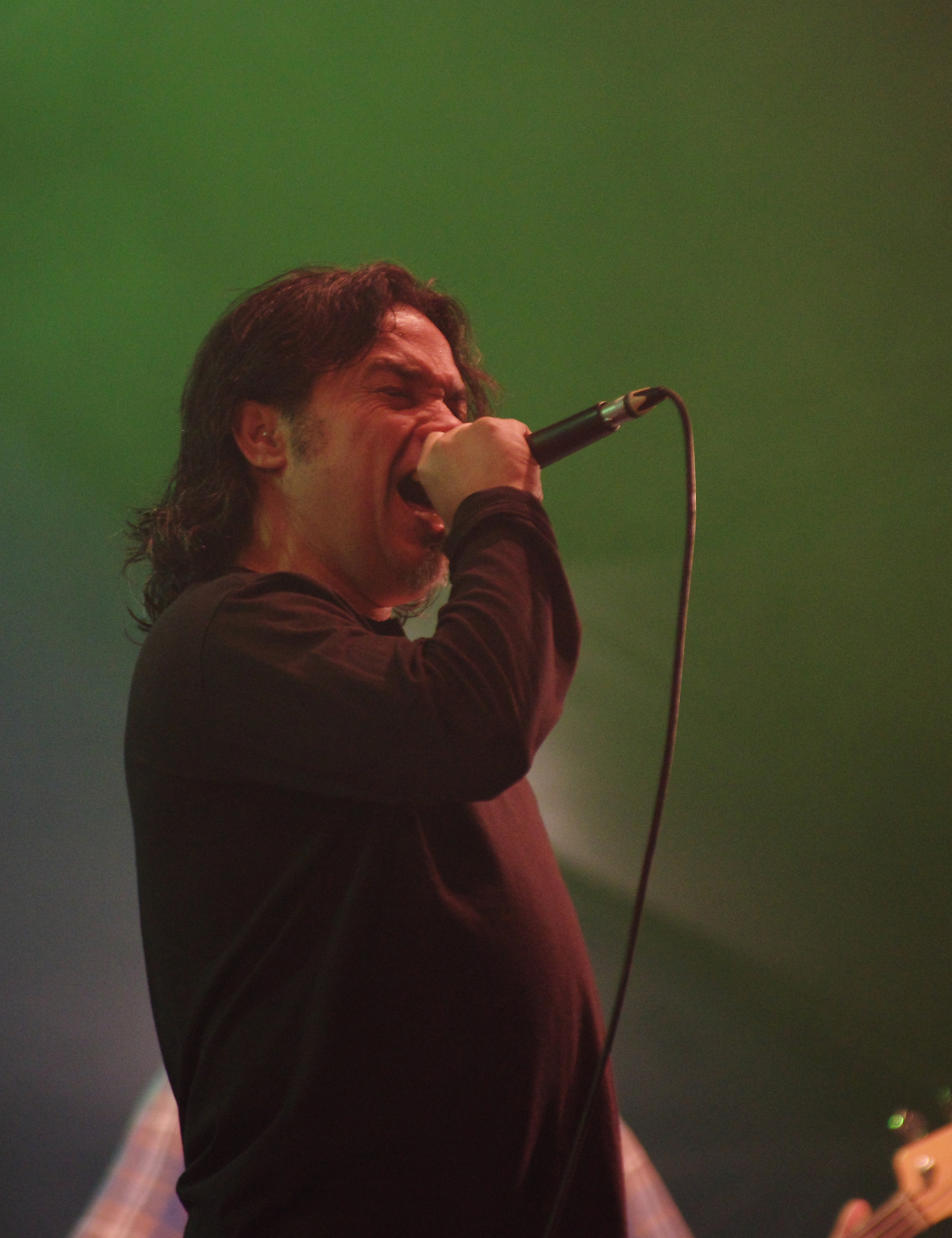 Black Flag beim Ruhrpott Rodeo 2013 in Hünxe. Besetzung: Dave Klein (Bass), Greg Ginn (guitar), Ron Reyes (voc), Gregory Moore (dr)